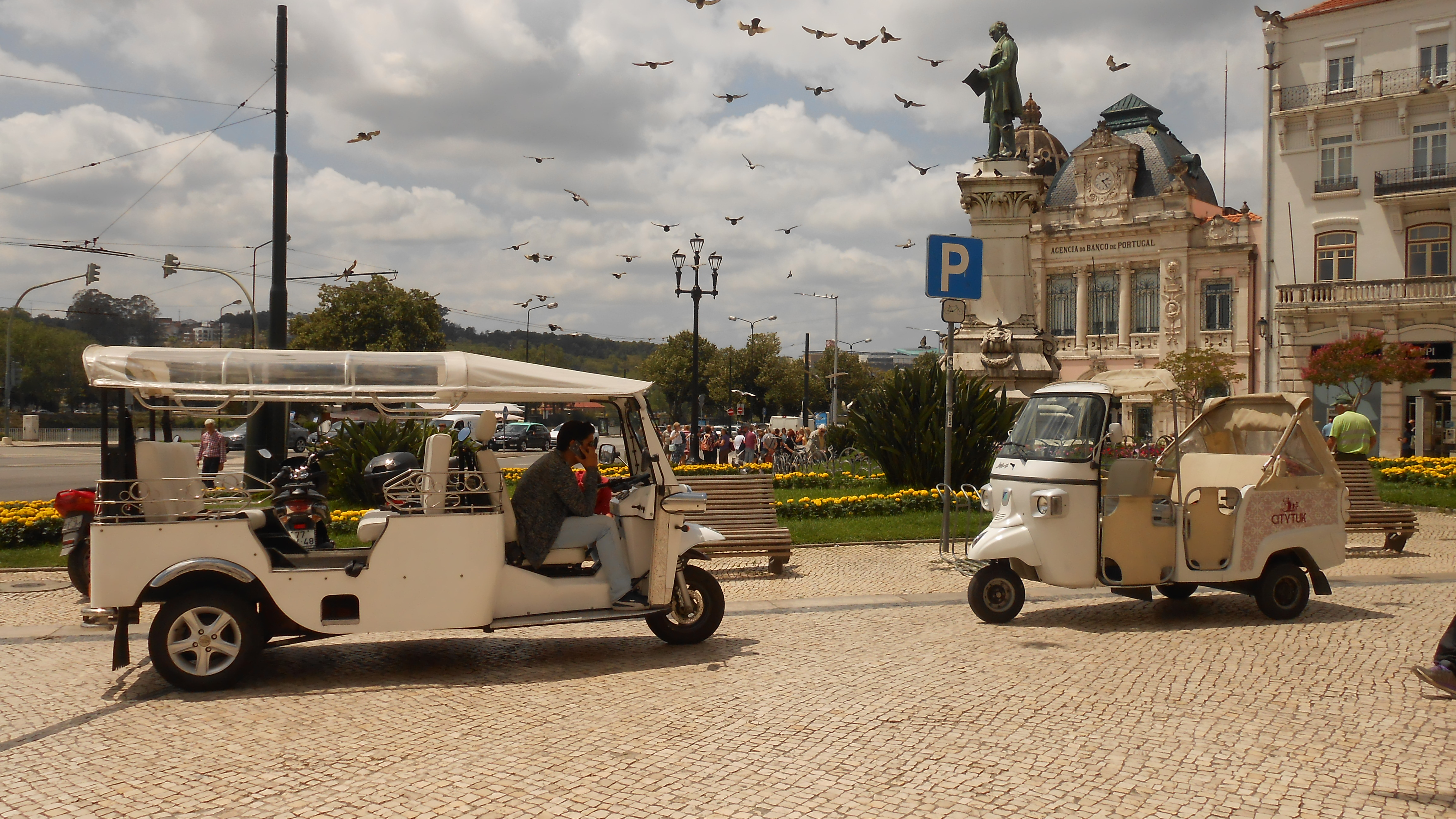 Tuk-tuks turísticos no Largo da Portagem, em Coimbra.